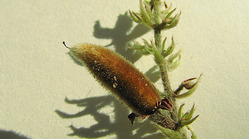 Developing fruit.